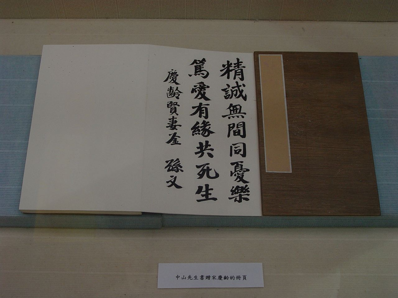 孫中山書贈宋慶齡的頁冊。置放在台北國父紀念館。